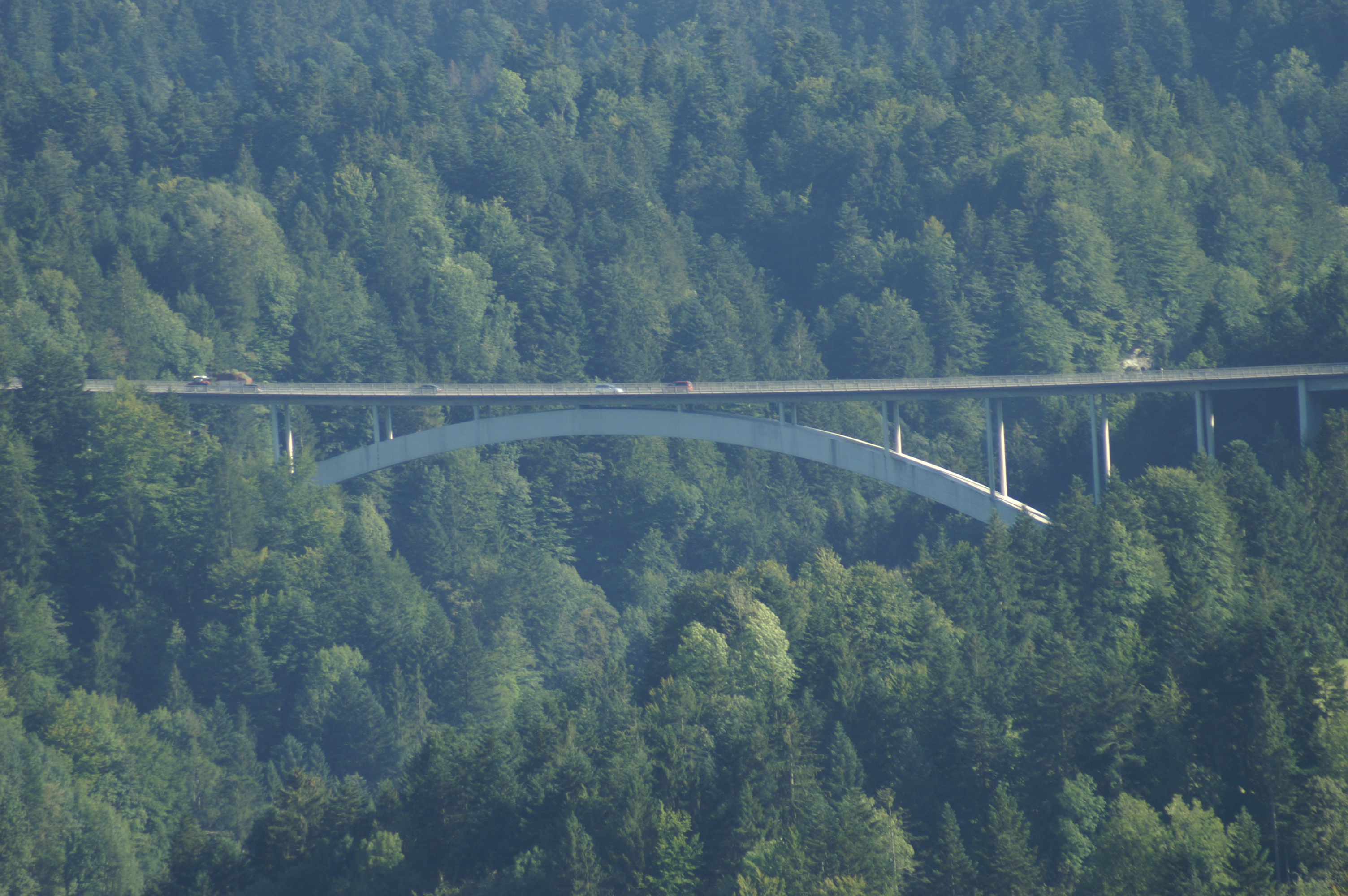 aus dem DEHIO Vorarlberg 1983: Stahlbeton-Bogenbrücke von Müselbach nach Lingenau siehe auch Lingenauer Hochbrücke Höhe 90m, Länge 370m, Bogenspannweite 210m; erbaut 1964 - 1968 nach Entwurf von Franz Aigner.